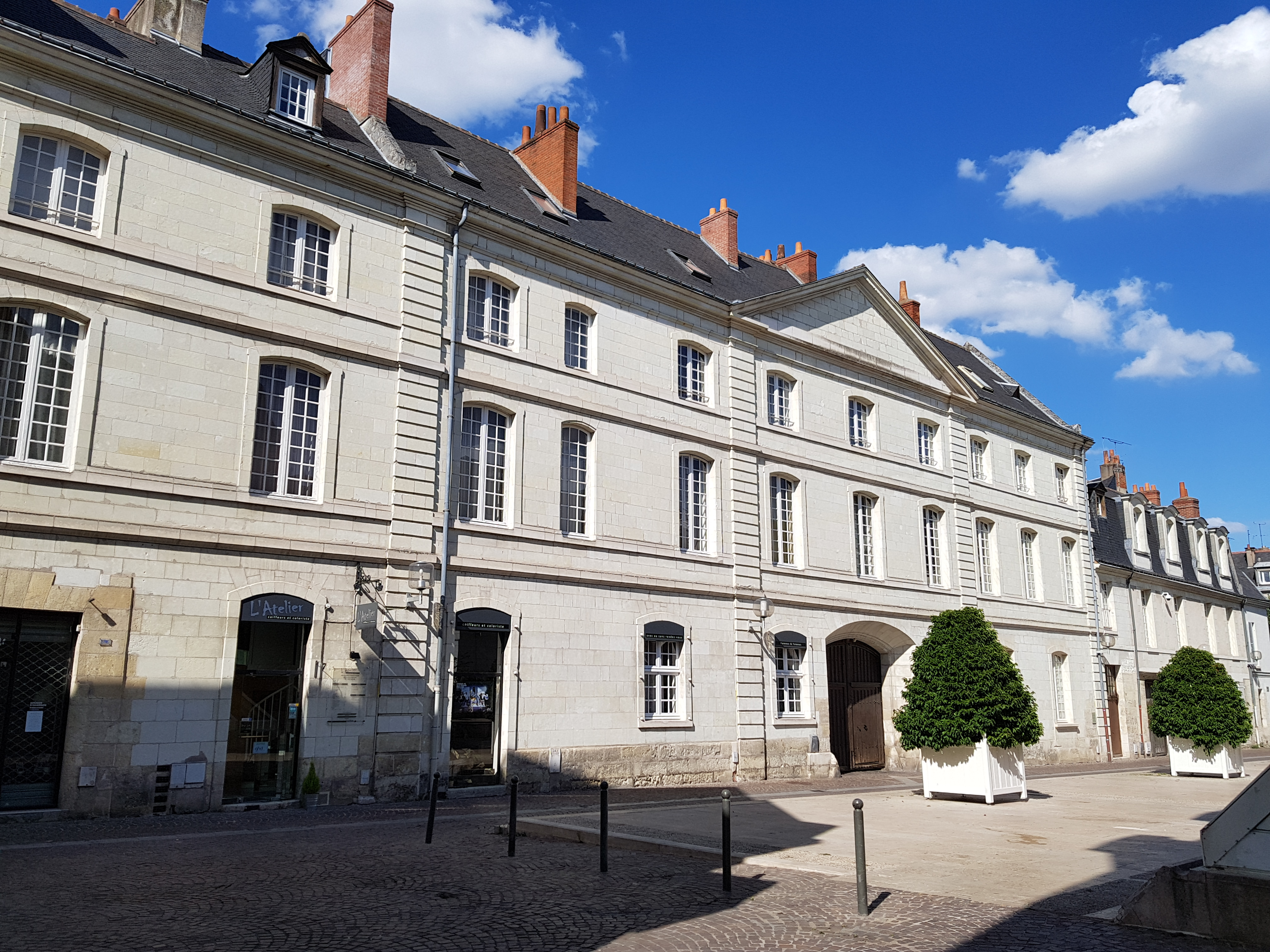 Palais des Monnaie, place de la Monnaie Tournois, XVIIe et XVIIIe siècle